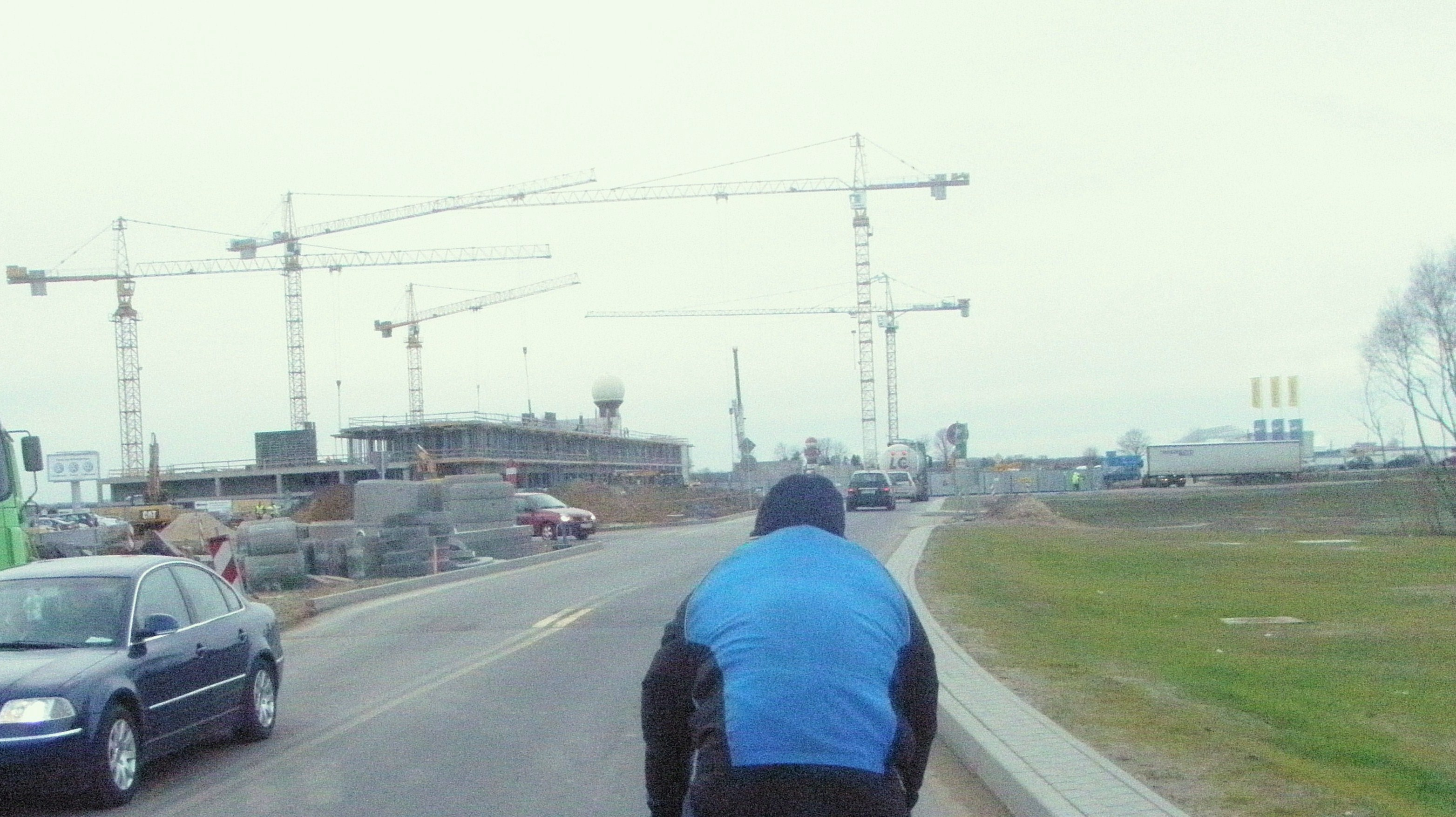 Port lotniczy Gdańsk im. Lecha Wałęsy, w rozbudowie (budowa terminala T2). Obok miejsce, na którym został zbudowany przystanek PKM Gdańsk Port Lotniczy.